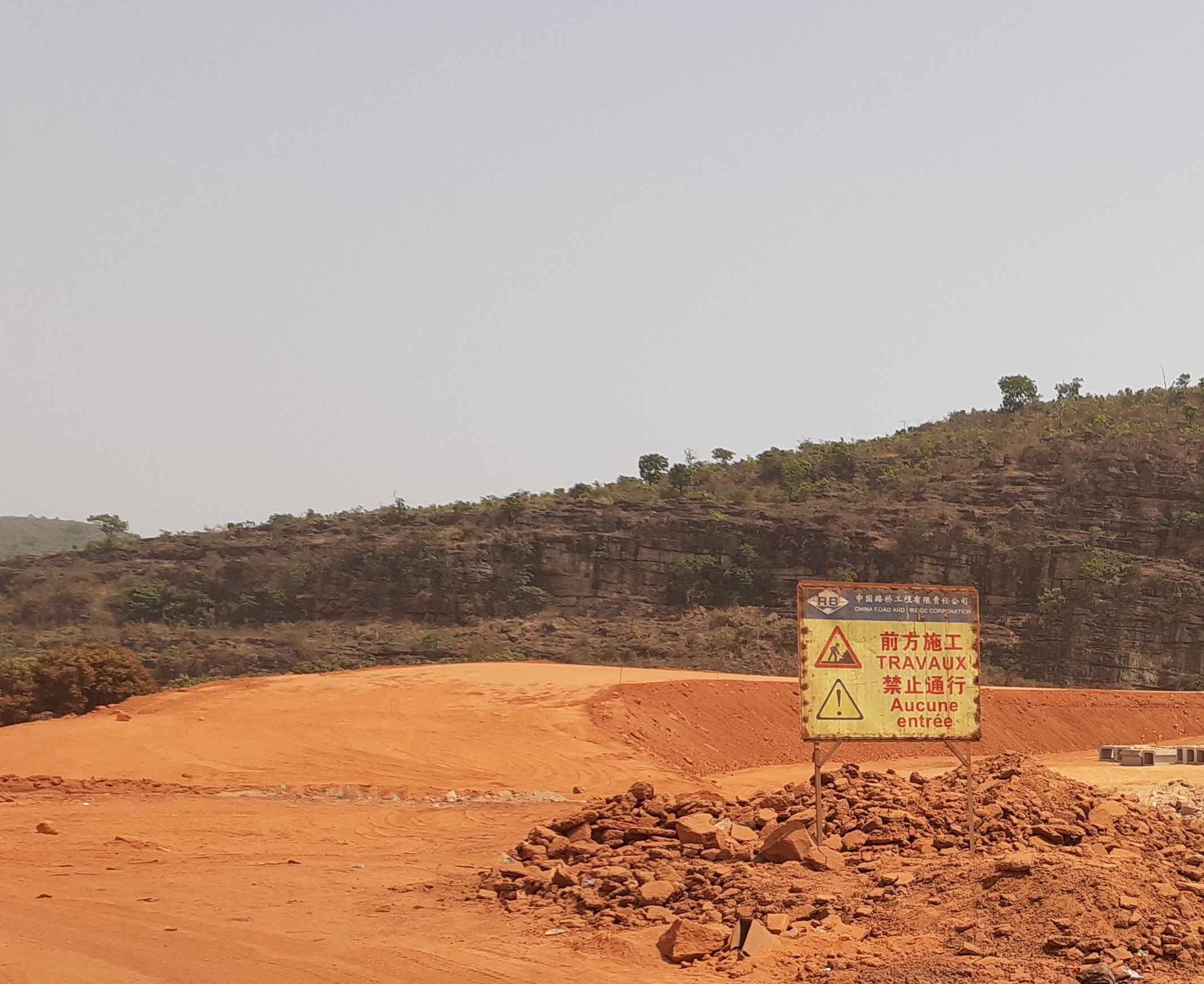 panneaux de signalisation sur la route conakry Coyah This is an image with the theme "Africa on the Move or Transport" from: Guinea